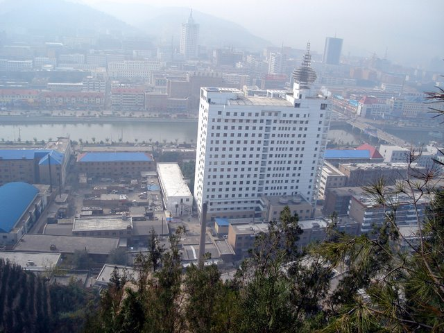 吕梁人民医院北侧-2006